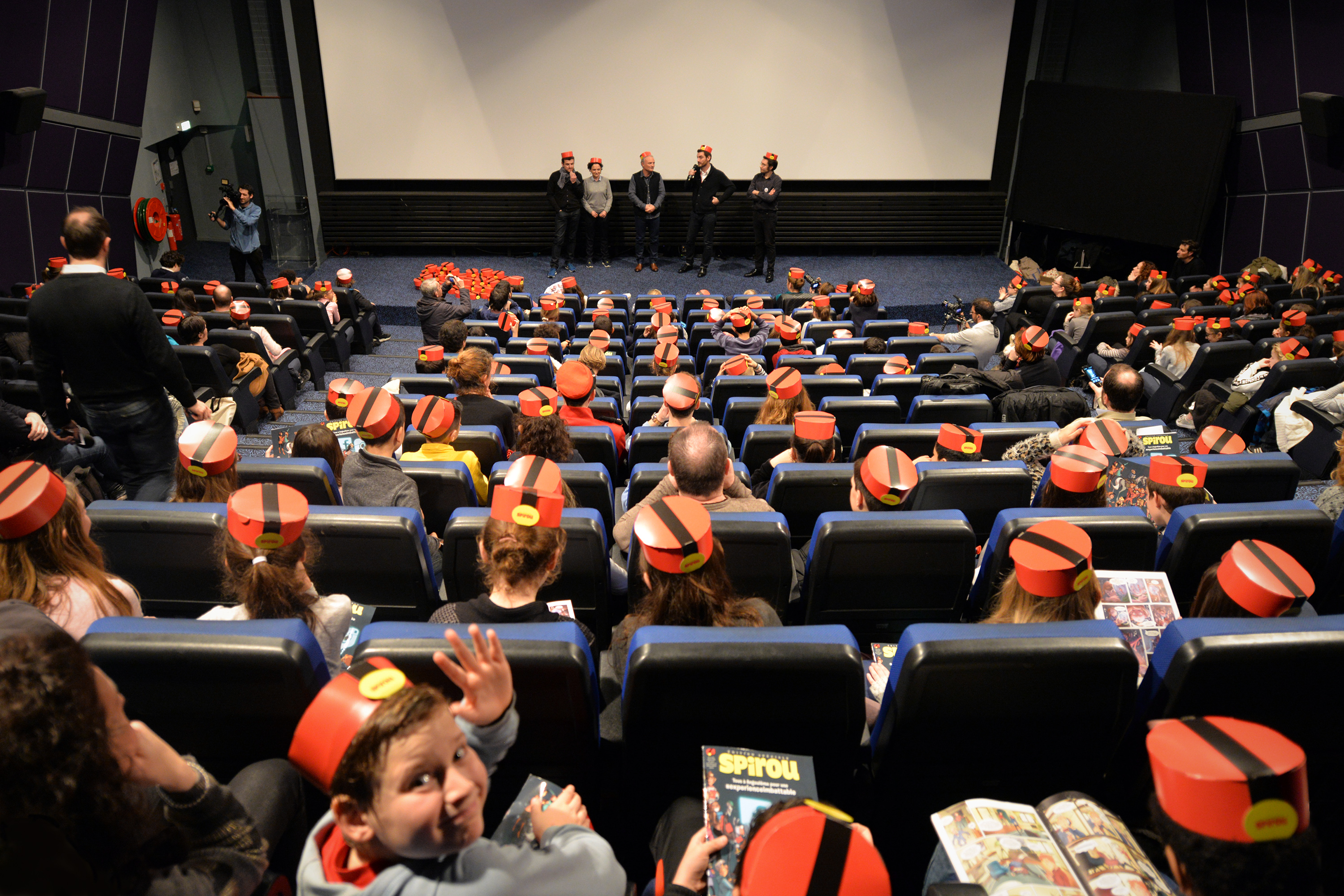 Fabien Suarez et Juliette Sales, les deux scénaristes, avec le producteur Marc Missonnier et le réalisateur Alexandre Coffre présentant l'avant-première de leur film Les Aventures de Spirou et Fantasio au Festival d'Angoulême 2018.